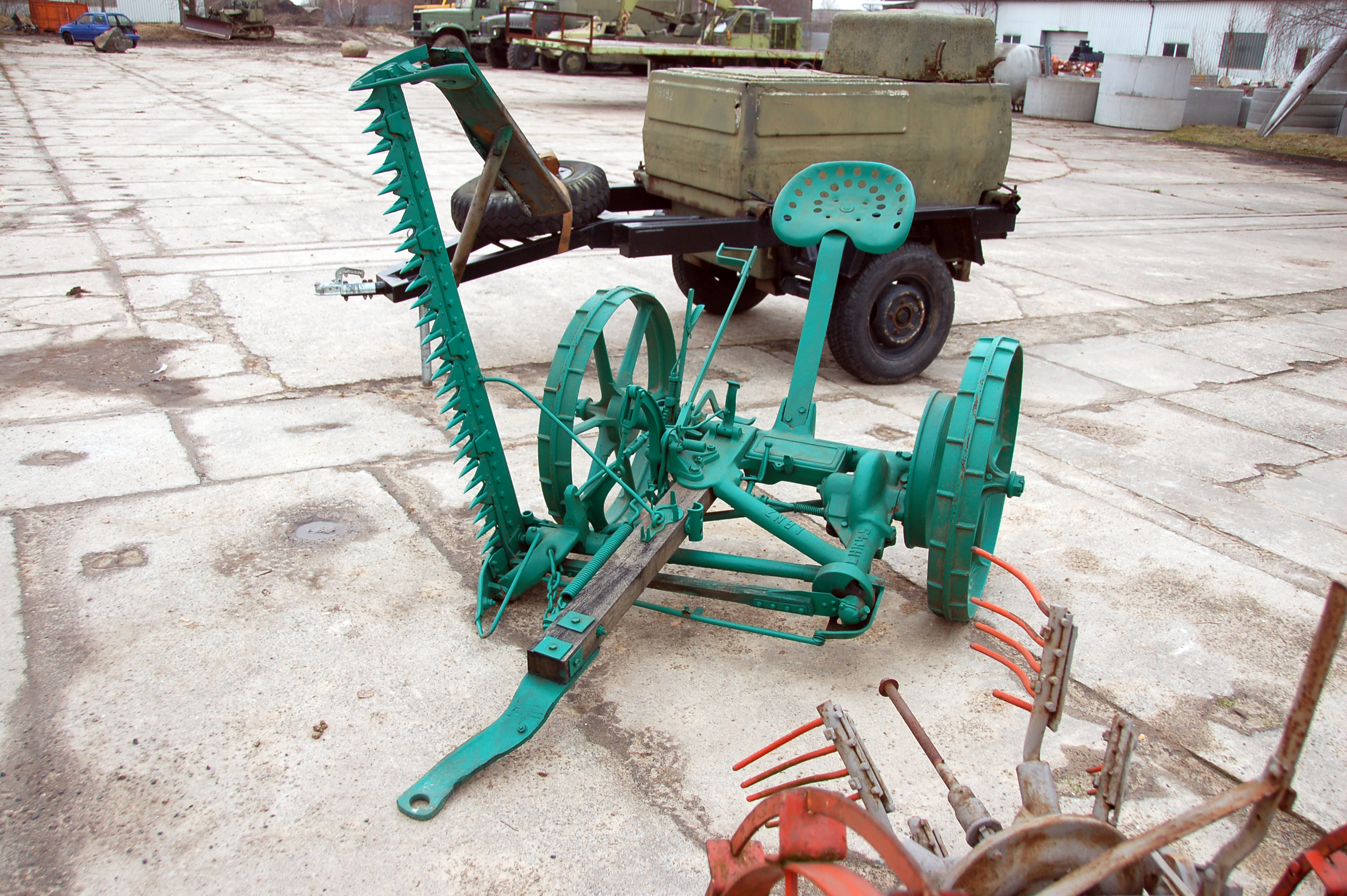 Lanz-Grasmäher LHR 45 im Technikpark MV in Grimmen; im Vordergrund Teile einer Kartoffelhexe